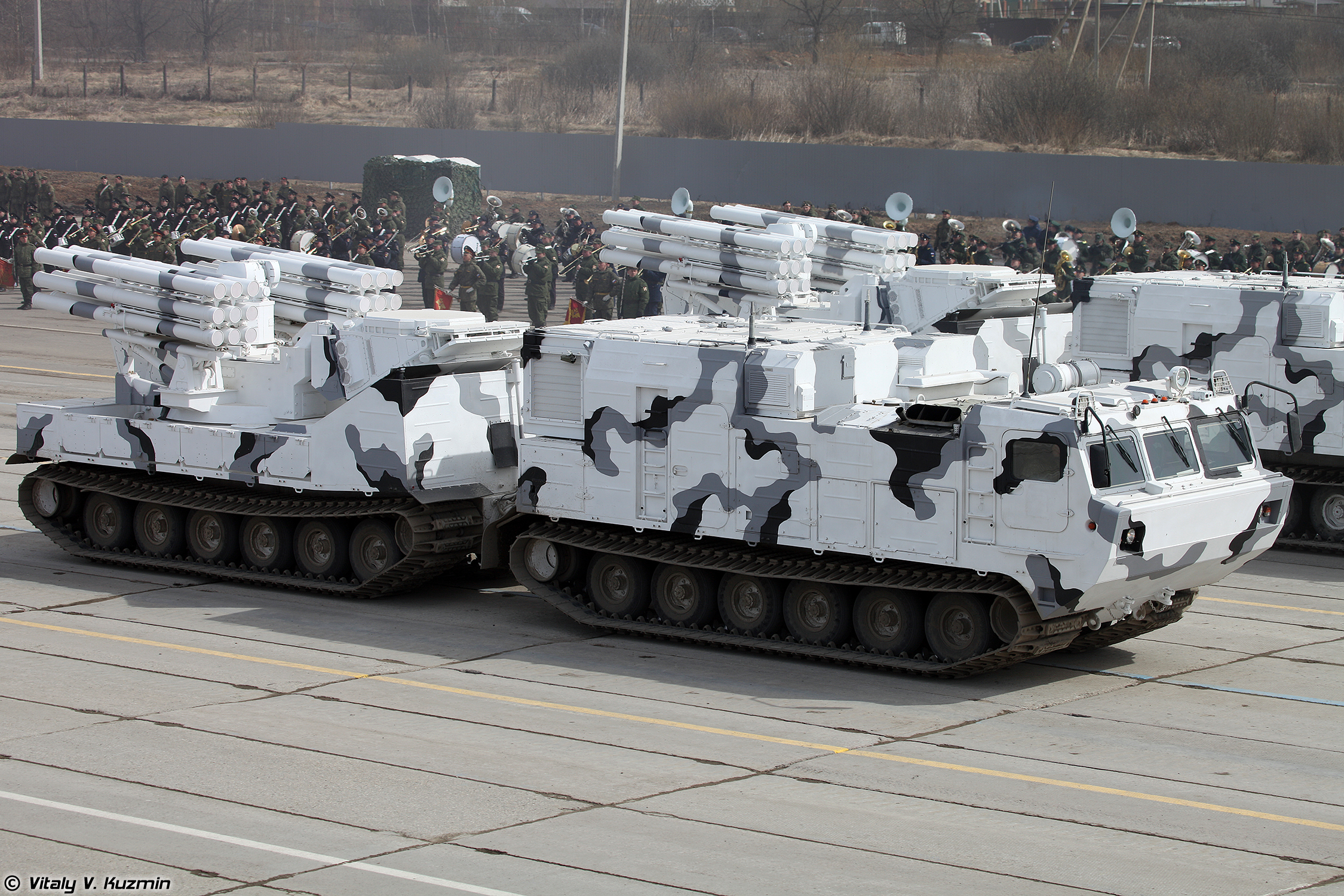 ЗРПК Панцирь-СА на базе двухзвенного гусеничного транспортера ДТ-30ПМ (Pantsir-SA air defence system on DT-30PM transporter chassis)